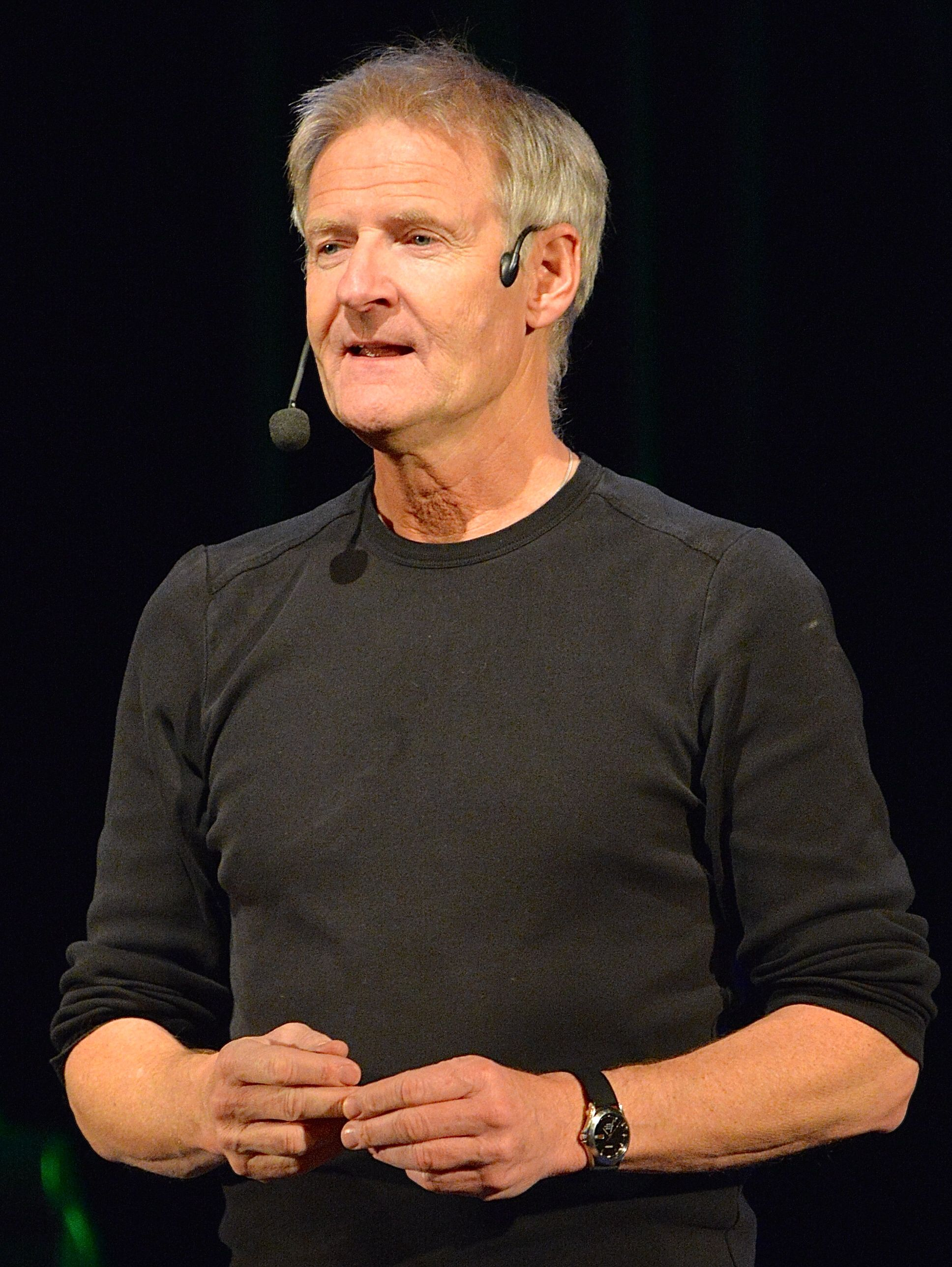 i ett framträdande under Strindbergsårets sista dag, den 20 januari 2013 i Kulturhuset i Stockholm.